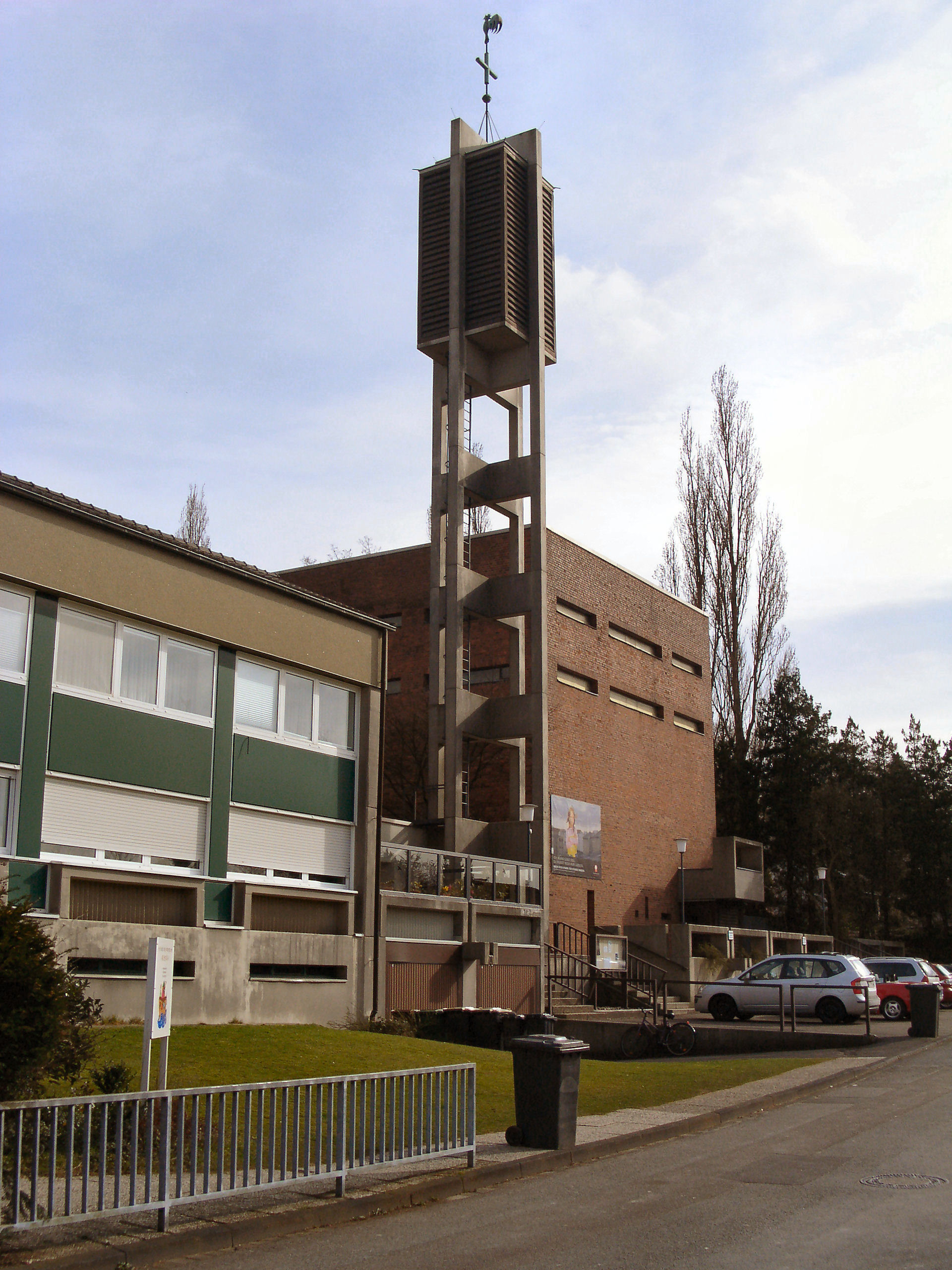 Heilig-Geist-Kirche in Rösrath-Forsbach